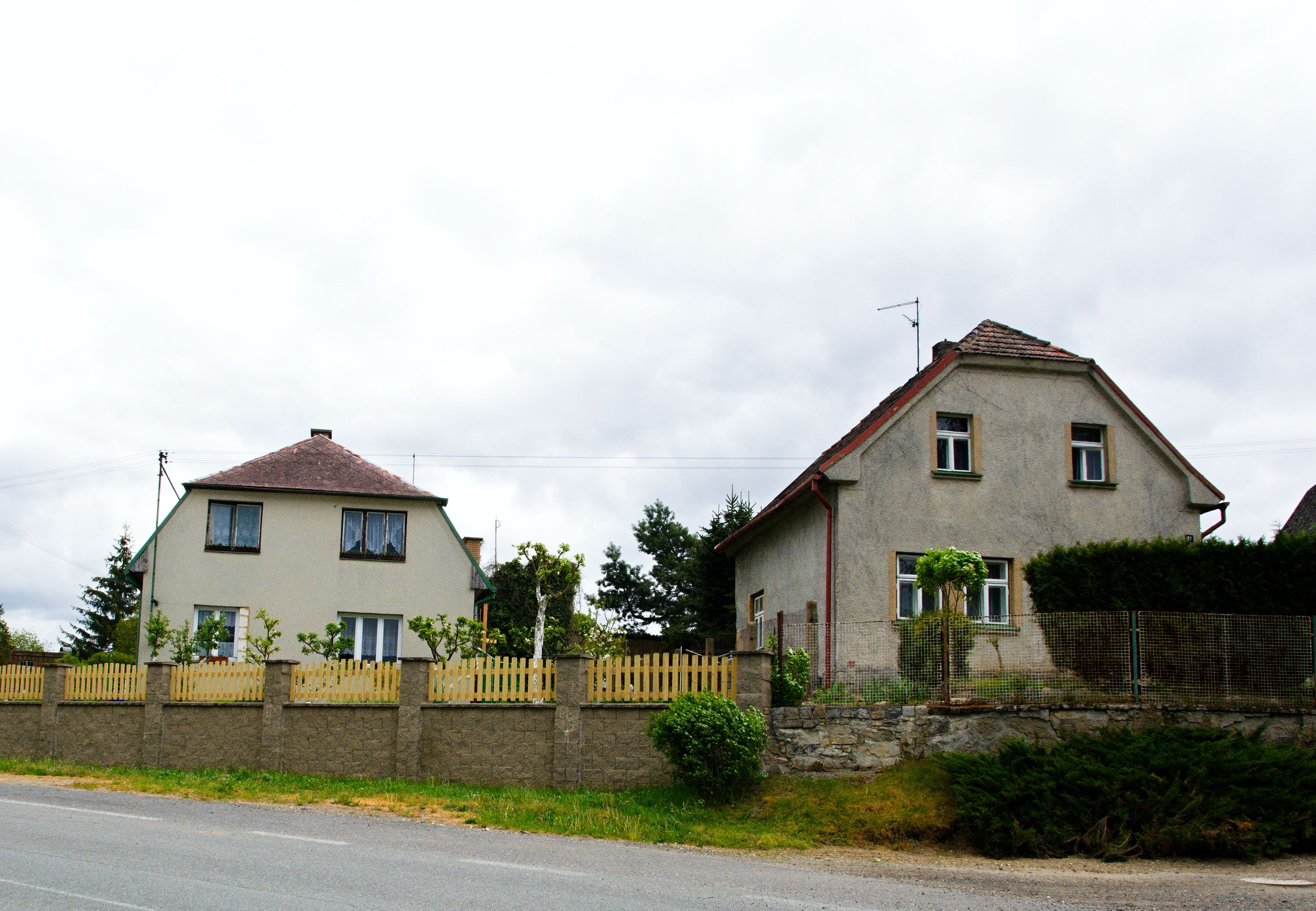 Kočov